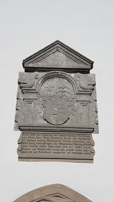 Über dem Portal an der Westseite des Turmes befindet sich eine Gedenktafel zum Neubau der Kirche im Jahre 1606 durch den damaligen Komtur Johann Friedrich Hund von Saulheim mit folgender Inschrift: "Anno 1606 den 9. Jan. hat der wohlerwürdige Gestrenge und Edele Herr Hans Friederich Hundt von Saulheim, St. Johans ordens Ritter, prior Datiae Comethur zue Würtzburg, Schleußingen und Weyßsensee, Röm. kaj. Rath diese Kirchen laßen abbrechen und mit Hülff ainer Gemain zue Biebelriedt solche von grundt wider aufbauen und zum Gottesdienst consaecriren und verfertigen lassen." Die Schrifttafel ist beiderseits mit Voluten verziert und wird von einem Gesims überdacht. Darüber befindet sich ein Wappenrelief. Der Schild ist in zwei Felder gespalten. Vorne oder (heraldisch) rechts zeigt er ein Lateinisches Kreuz und hinten oder (heraldisch links) drei mit den Spitzen nach links gerichtete Mondsicheln, einen sechsstrahligen Stern einschließend. Auf dem Schild wucherndes Blattwerk wird überragt von einem Lateinischen Kreuz auf rundem Feld und einem Hahnenfederbusch. Es handelt sich um das Wappen des damaligen Komturs Johann Friedrich Hund von Saulheim, welches aus dem Zeichen der politischen Souveränität des Malterserordens und dem Familienwappen der Hund von Saulheim zusammengesetzt ist. Der Schild steht unter einem Portal dessen Säulen von Raubfischen gekrönt sind, deren geöffnete Mäuler scharfe Zähne erkennen lassen. Das Relief ist weist am rechten und linken Rand jeweils drei abgerundete Ornamente auf. Inschrift und Wappenrelief werden von einem dreieckigen Spitzdach überragt.